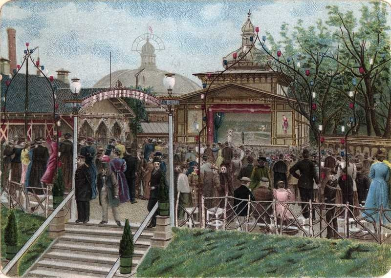 Tivoli av Gustav Lærum, ant. fra ca. 1900